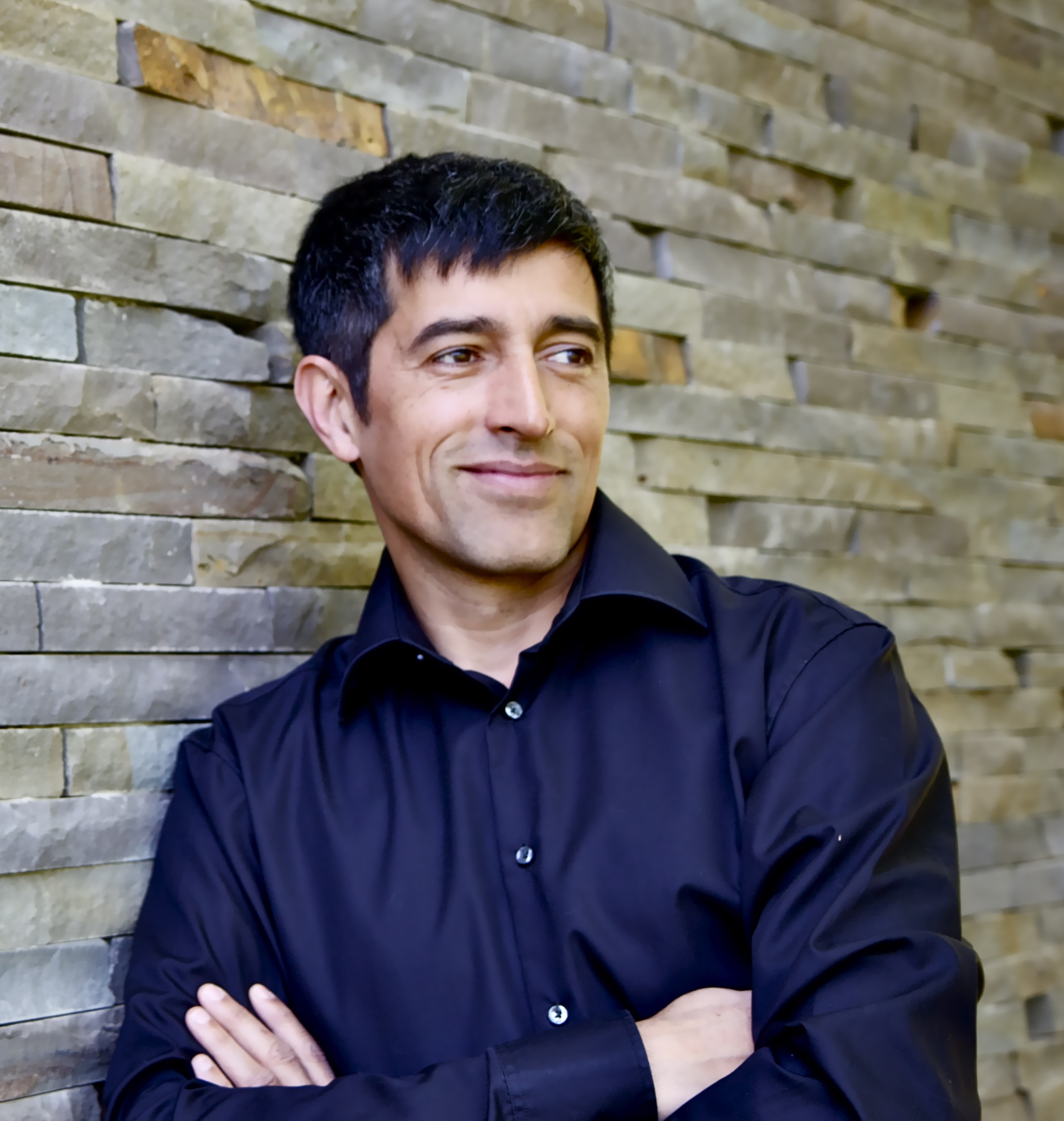 Ranga Yogeshwar, deutscher Diplom-Physiker und Moderator